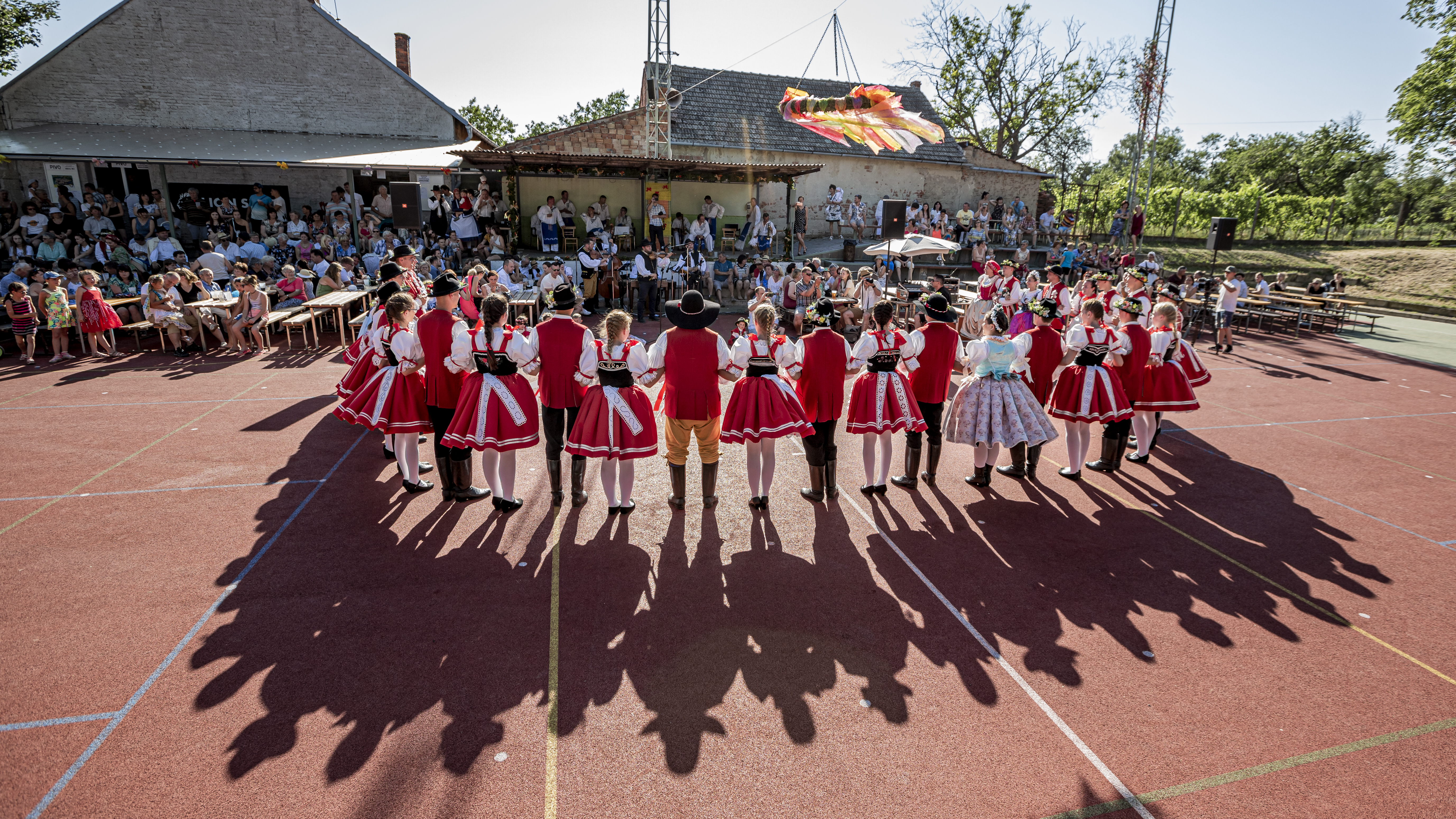 Hody Újezd u Brna Personality rights warningAlthough this work is freely licensed or in the public domain, the person(s) shown may have rights that legally restrict certain re-uses unless those depicted consent to such uses. In these cases, a model release or other evidence of consent could protect you from infringement claims.